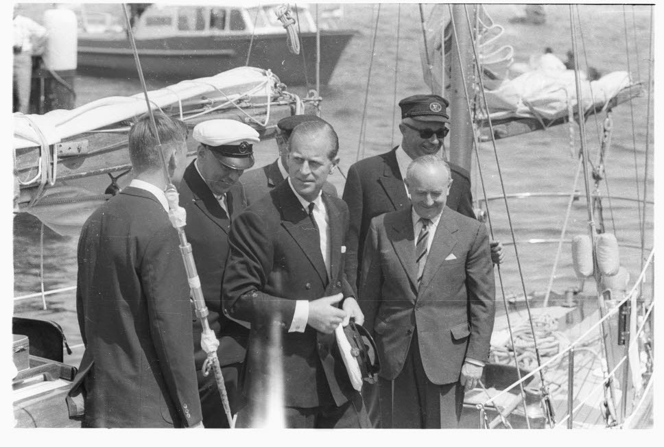 Prinz Philipp (3.v.l.) mit Ministerpräsident von Schleswig-Holstein Helmut Lemke (2.v.l.), dem brit. Botschafter Sir Frank Roberts (3.v.l.) und dem KYC-Wettfahrtleiter der Kieler Woche Otto Schlenzka (4.v.l.) an Bord seiner Yacht BLOODHOUND (brit.) bei der Rückkehr in den Alten Olympiahafen.